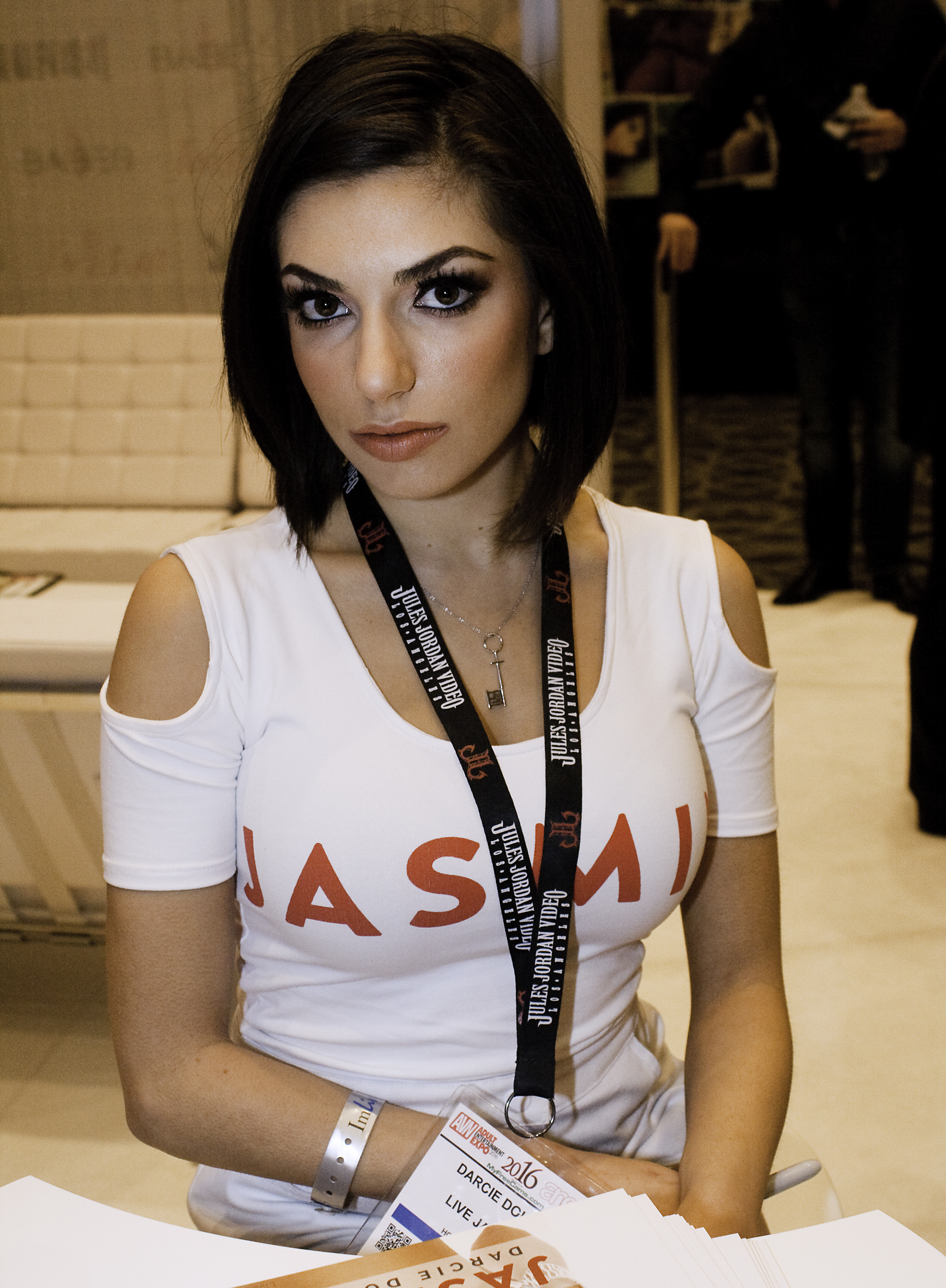 AEE16_0407bas